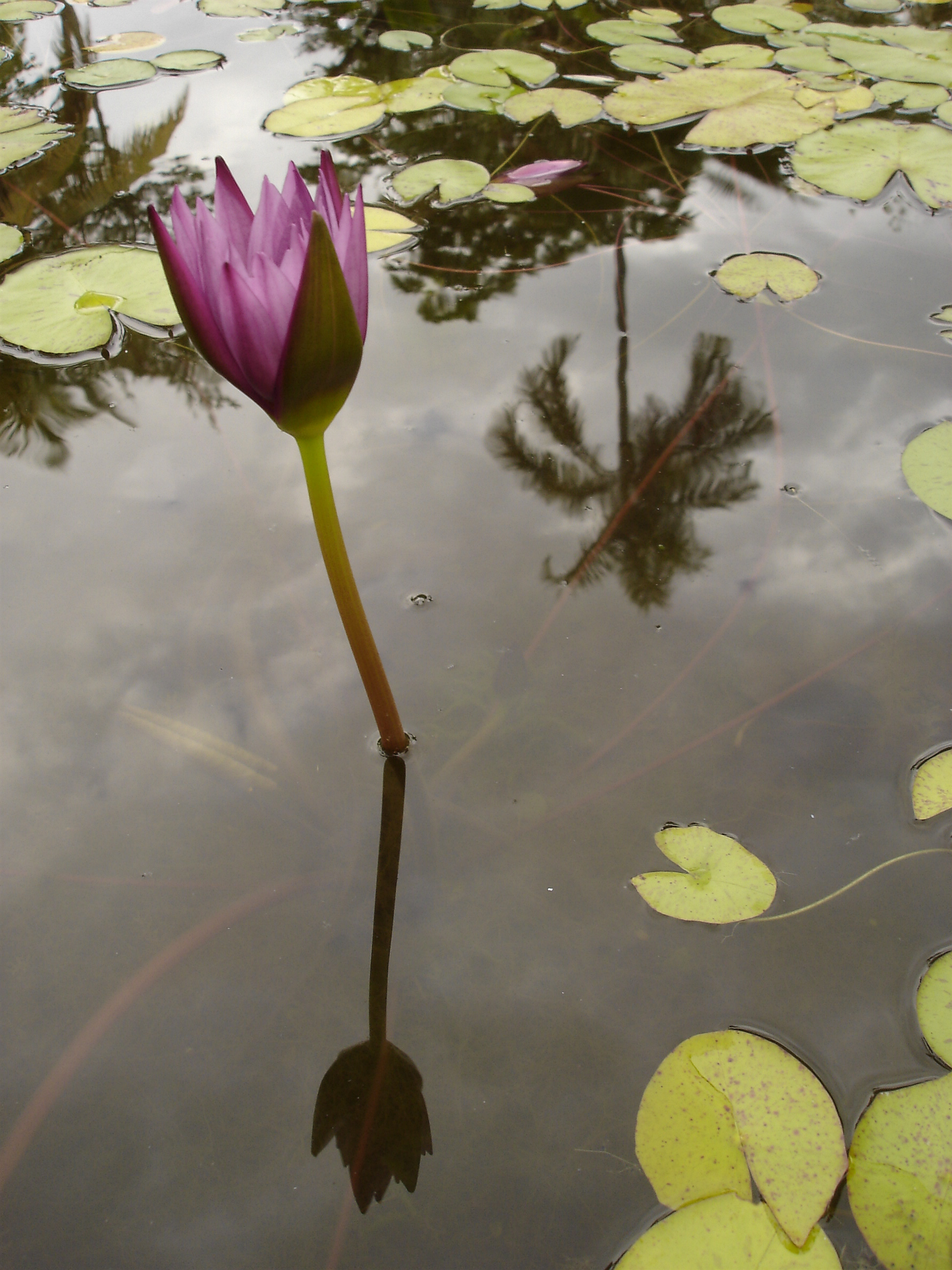 Description: Nénufar au Jardin de l'Etat, novembre 2004, Saint-Denis de la Réunion Source:Bouba